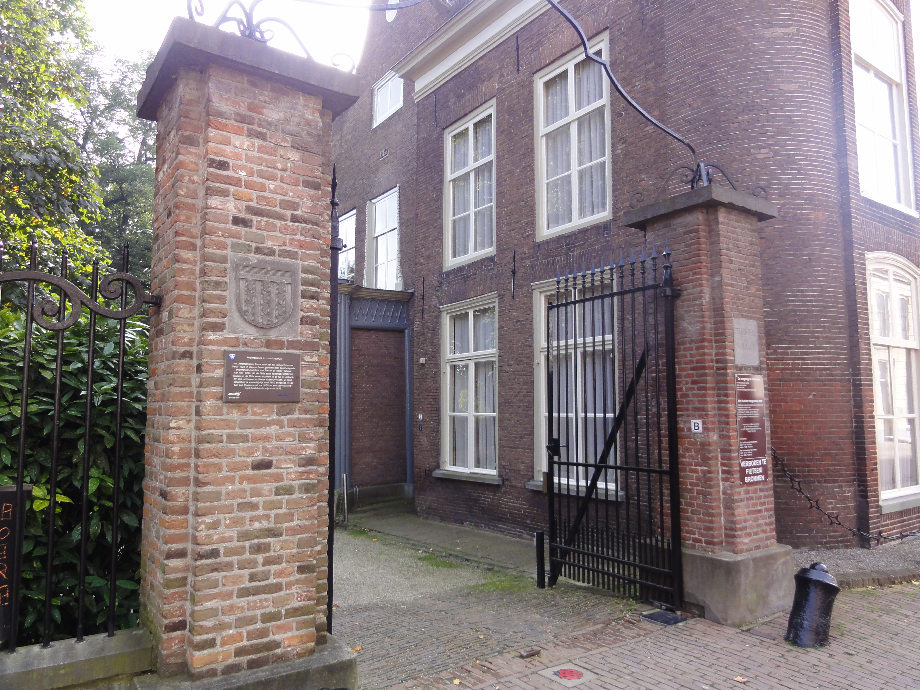 Tiel Rijksmonument 35556 Ambtmanshuis, nu gemeentehuis , de poort 26″ N, 5° 26′ 01.3″ E